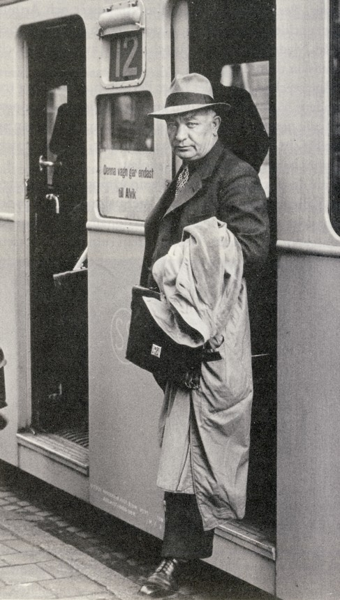 Per Albin Hansson stiger av spårvagnen vid Alvik, ca 1945. .